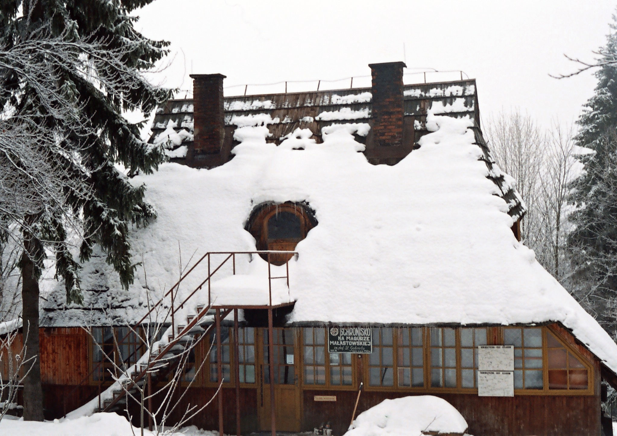 Magura Małastowska - Schronisko PTTK im. Stanisława Gabryela